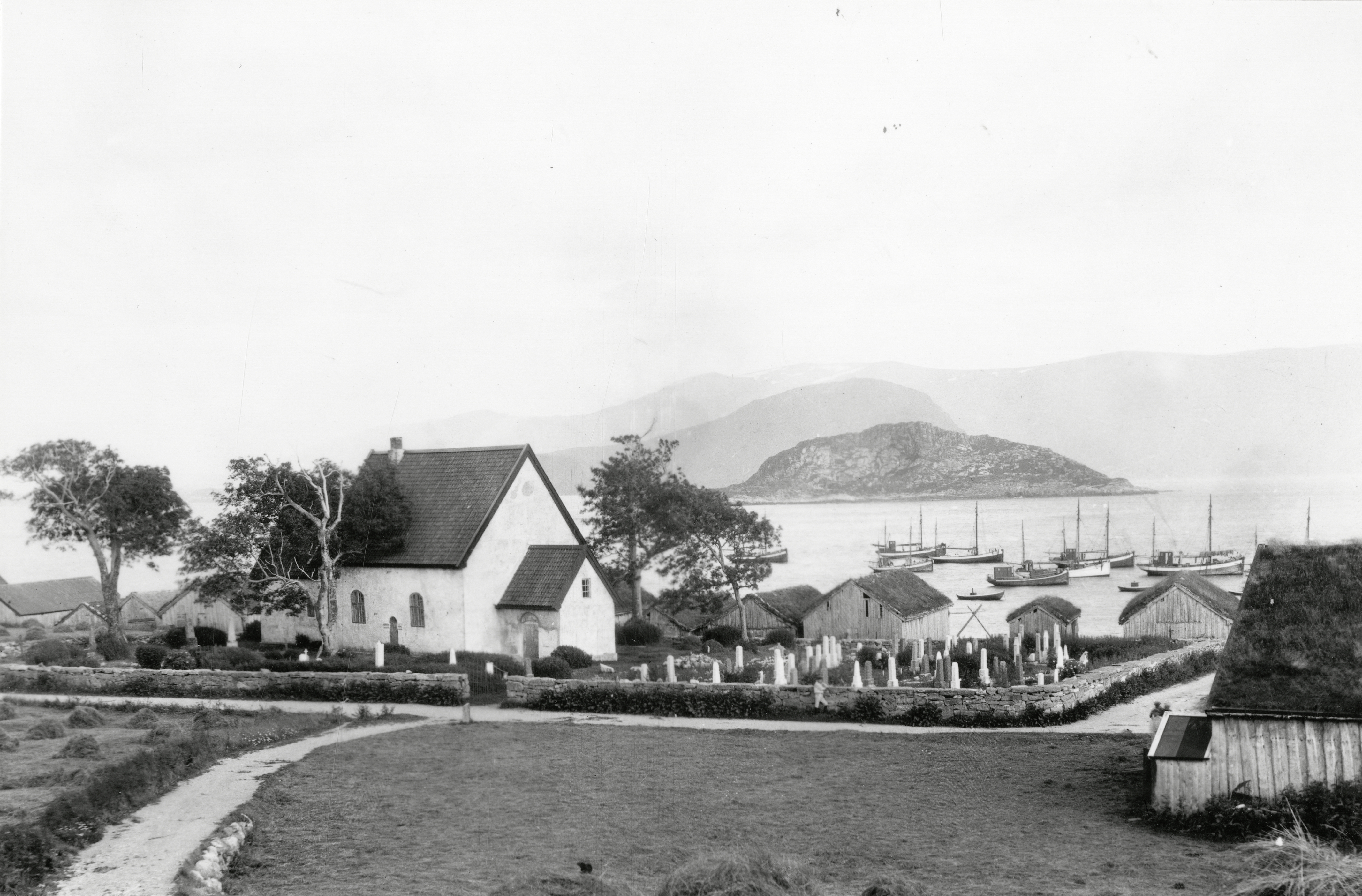 Giske kirke i Giske, Møre og Romsdal Restaurert 1756/1930. This image on crowdsourcing geotagging platform Fotodugnad